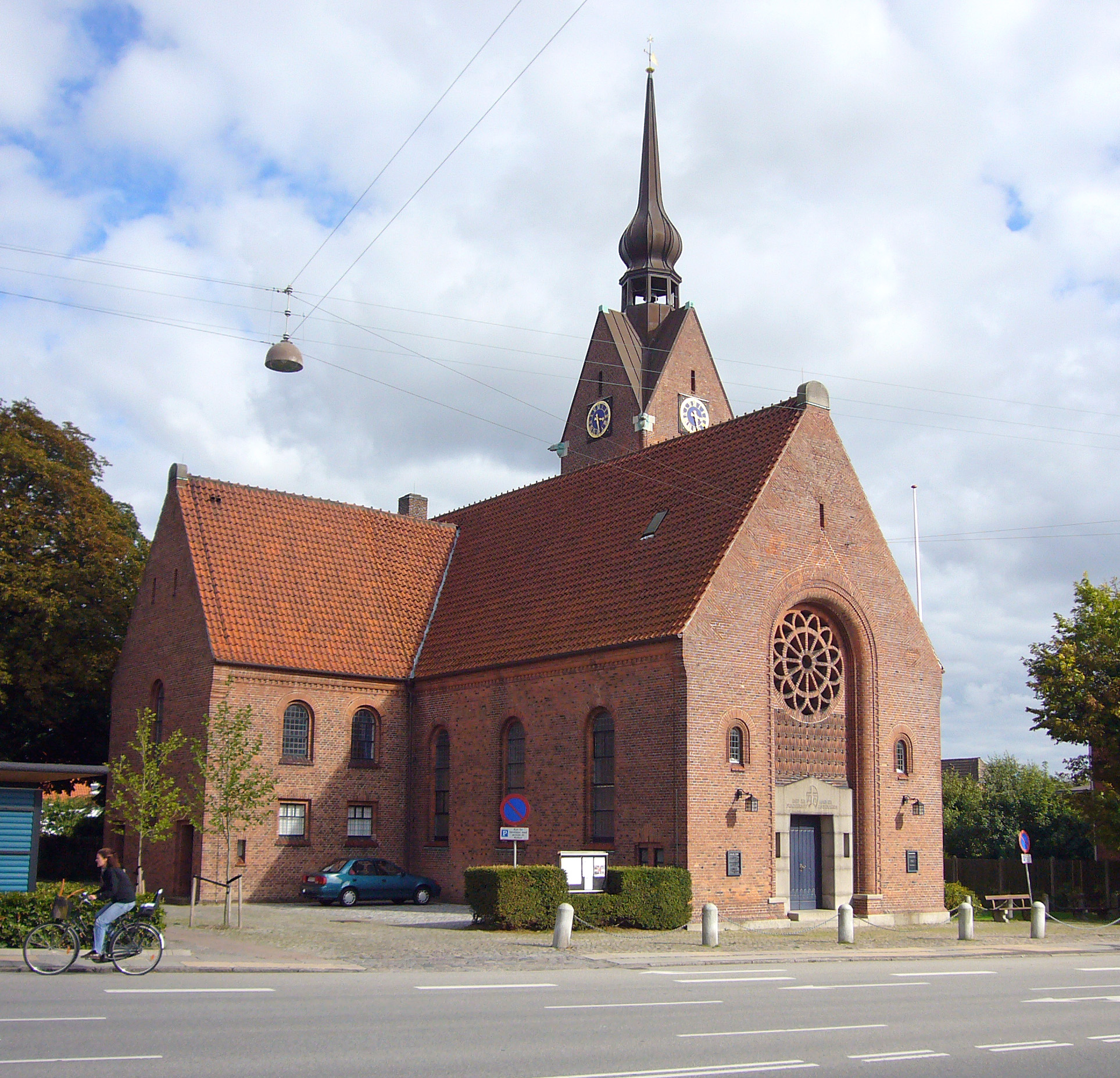 Vanløse Kirke, Vanløse, Copenhagen, Denmark. Vanløse Kirke